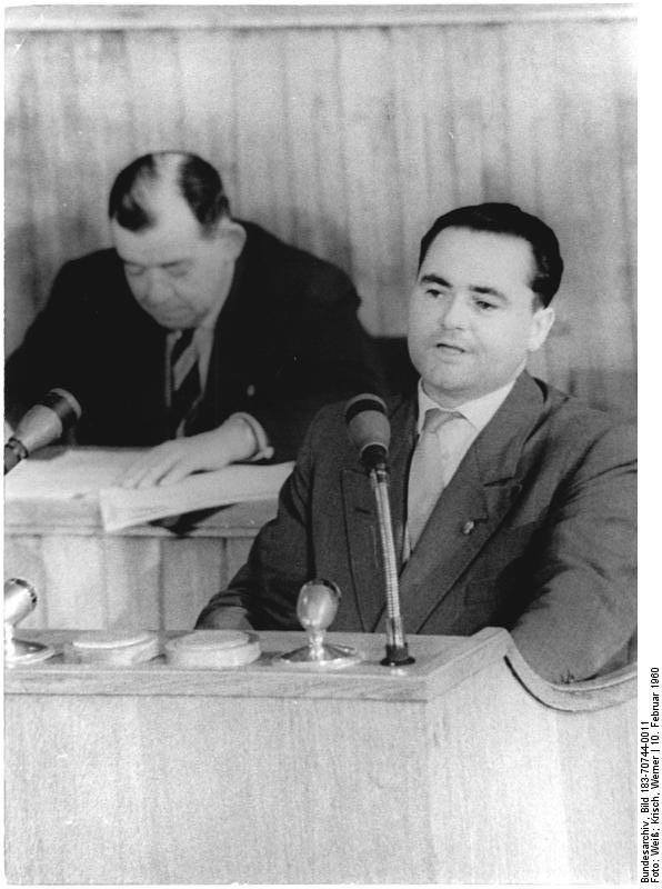 Zentralbild/Weiß-Krisch 10.2.1960 Bedeutsame Volkskammer-Sitzung am 10.2.1960 Der Präsident der Volkskammer, Dr. Johannes Dieckmann, eröffnete die mit Spannung erwartete 10. Sitzung der Obersten Volksvertretung der DDR. Auf der Tagesordnung stehen eine bedeutsame Regierungserklärung, die von Ministerpräsident Otto Grotewohl abgegeben wird, sowie die Verabschiedung des Gesetzes über den Vertrag vom 8. Oktober 1959 über Handel und Seeschiffahrt zwischen der DDR und der Volksrepublik Albanien und die Wahl des Generalstaatsanwalts der DDR. UBz: Abgeordneter Rudolph Agsten (LDPD) spricht zur Diskussion.